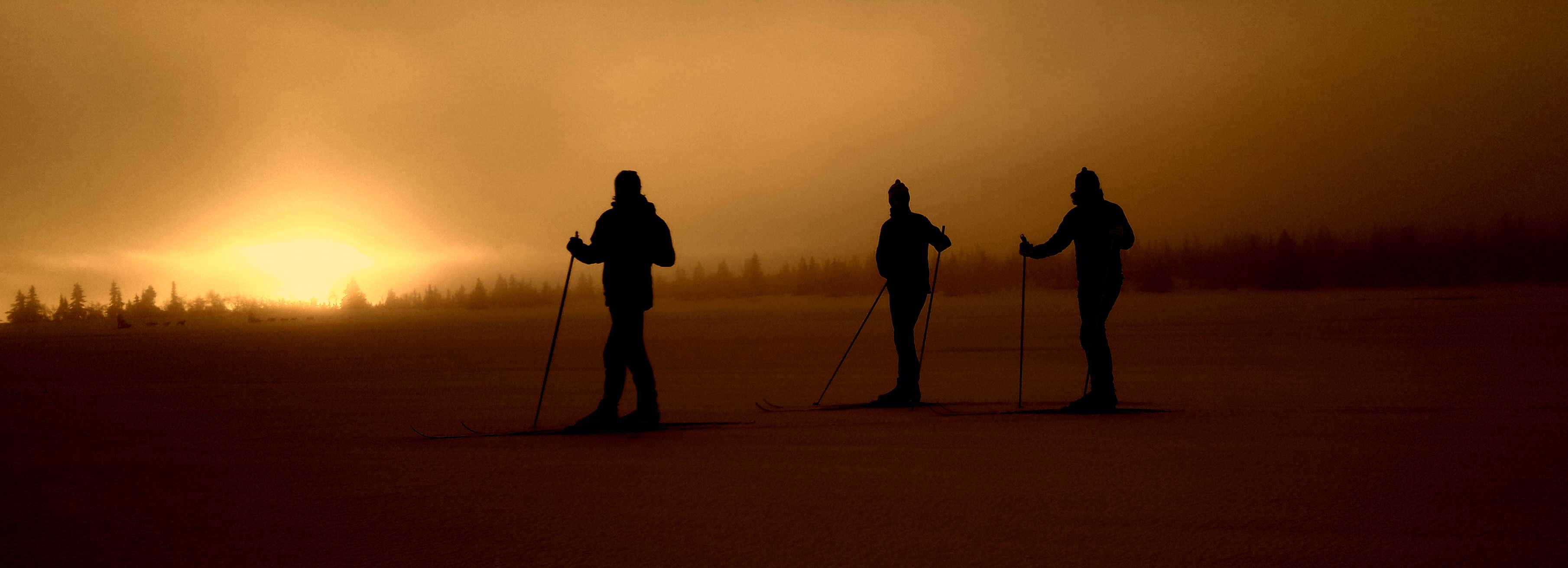 From my Nokia. I'm @heidenstrom on Twitter